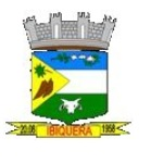 Trata-se de símbolo oficial do Município de Ibiquera previsto na Lei Orgânica Municipal.